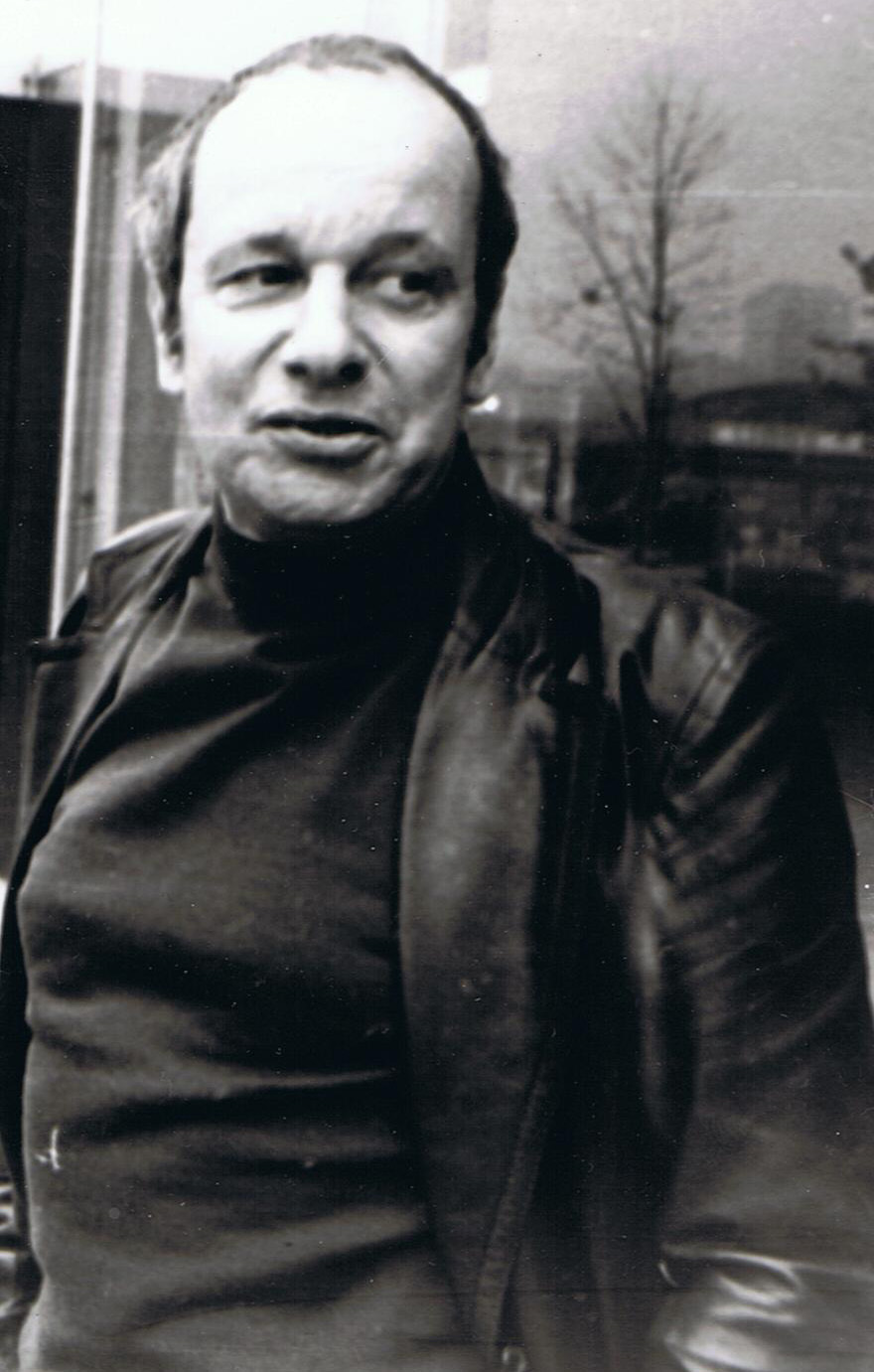 ژان-لویی بوری در دهه ۷۰